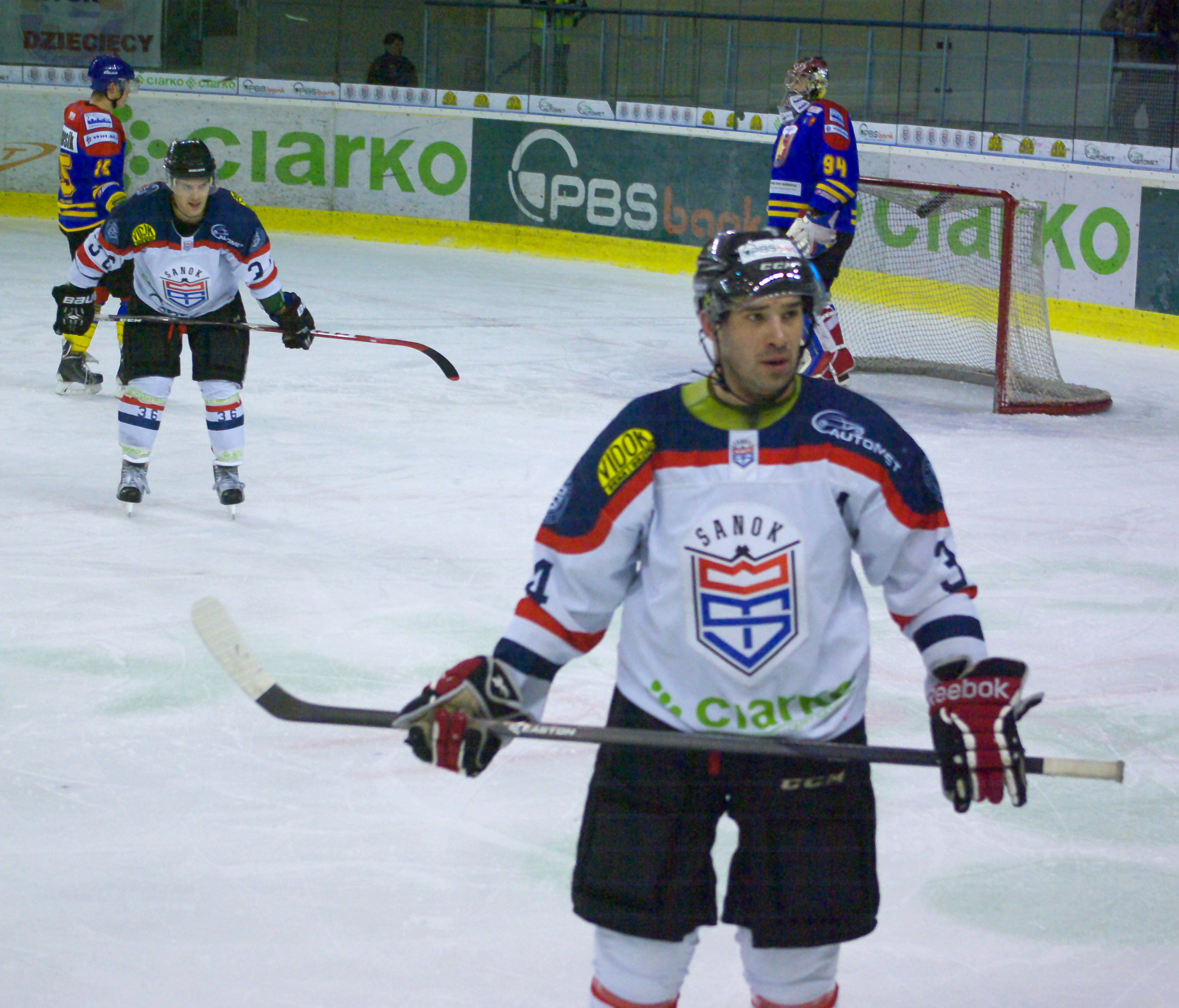 Mike Danton i Benjamin Breault w barwach STS Sanok w meczu przeciw Podhalu Nowy Targ (23 października 2015)